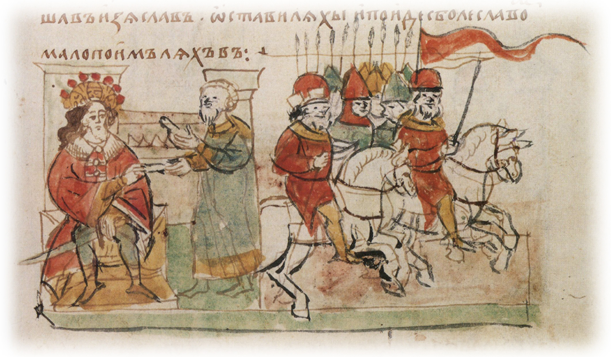 Усяслаў на стальцы, Радзівілаўскі летапіс